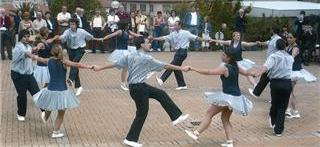 Exemple de contrapàs